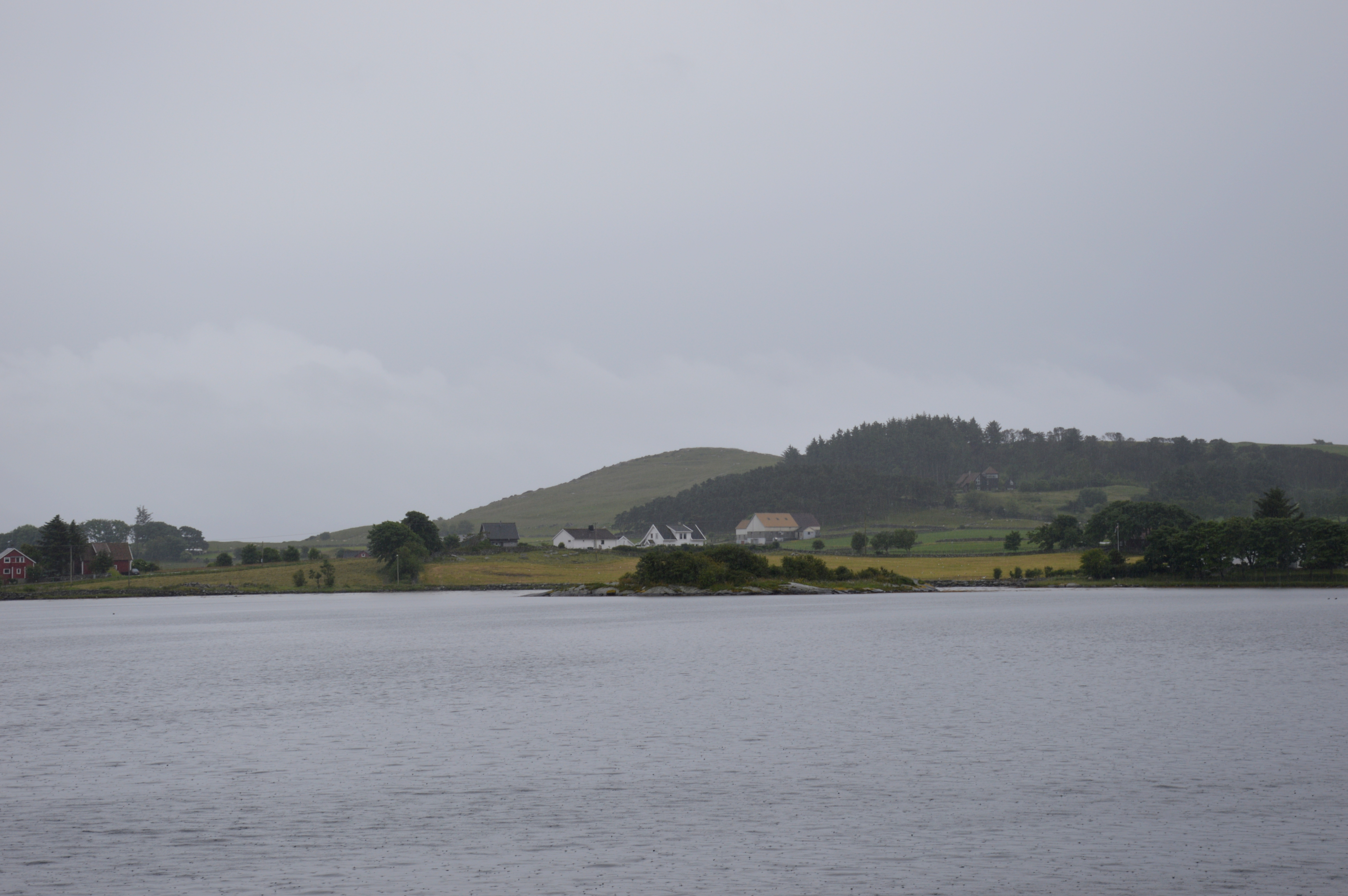 Fjøløy 2017 Blick vom Kloster